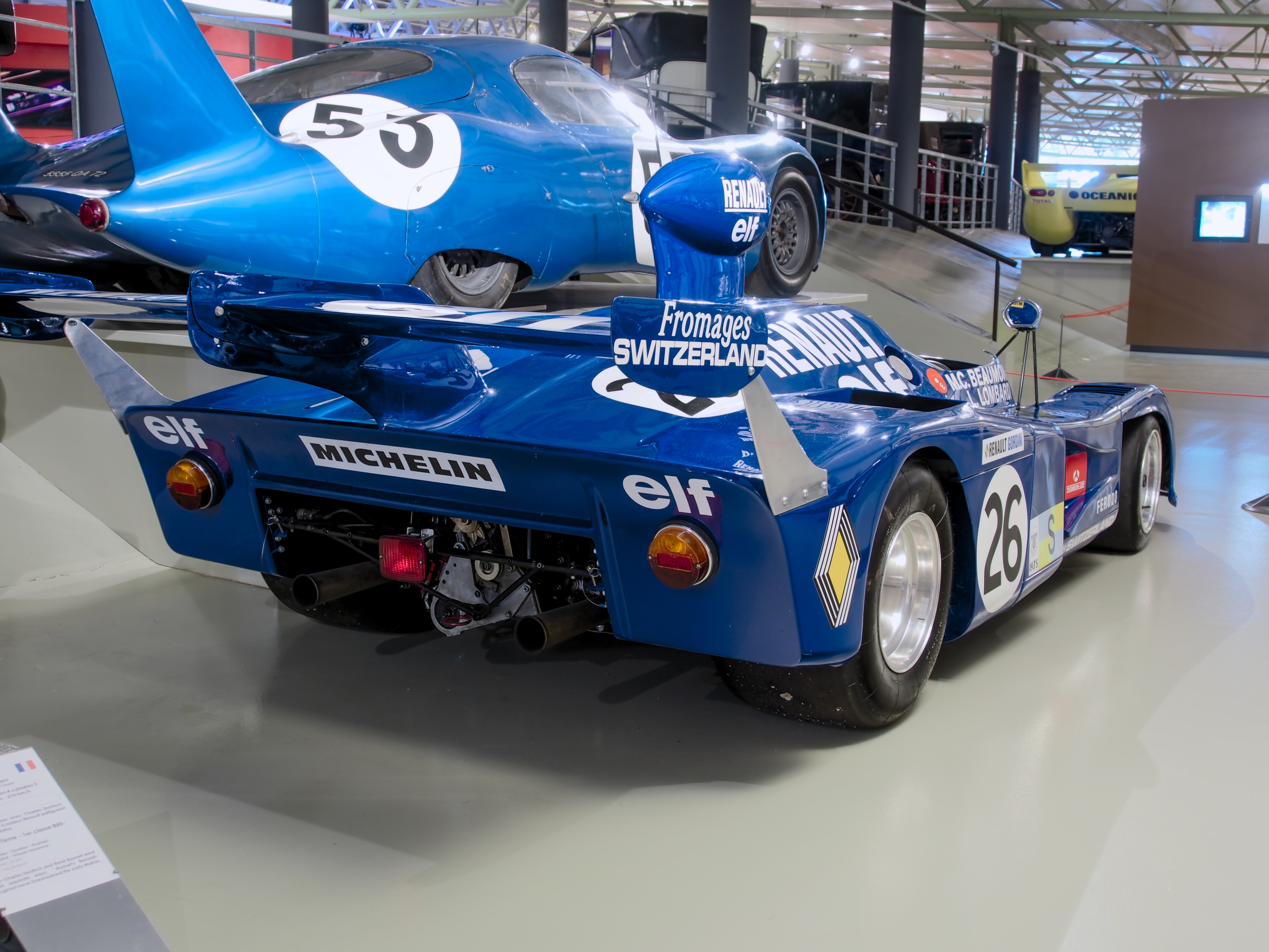 Photographed at Musée des 24 Heures du Mans, France.